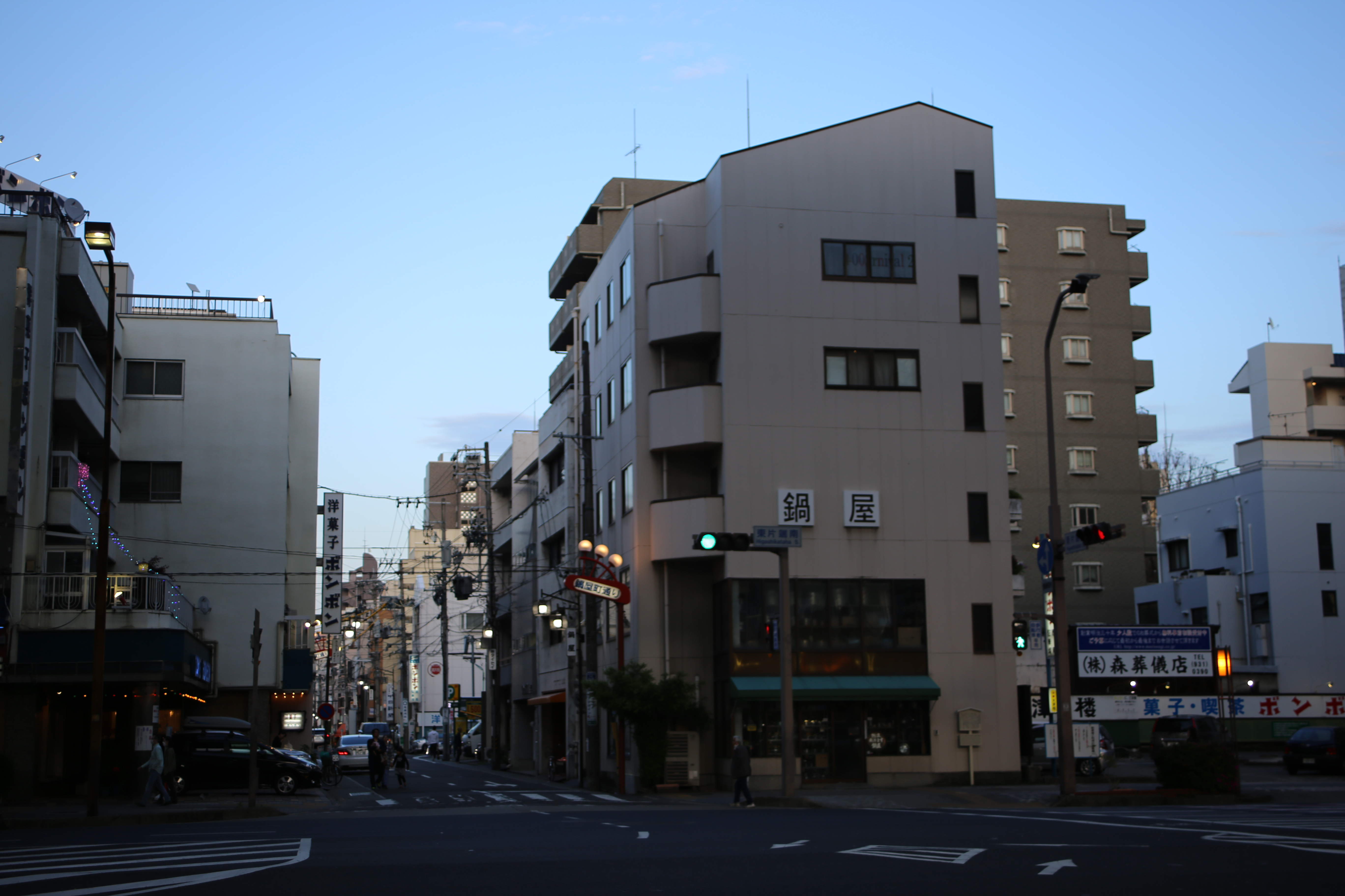 名古屋市東区泉の東片端南交差点を北西角から写す。旧鍋屋町の痕跡を示す。